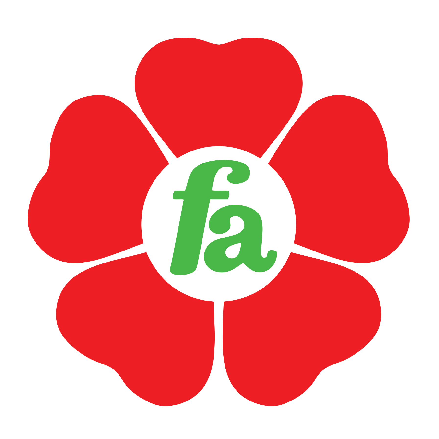 Logotipo del Frente Amplio Por Justicia, Vida y Libertad